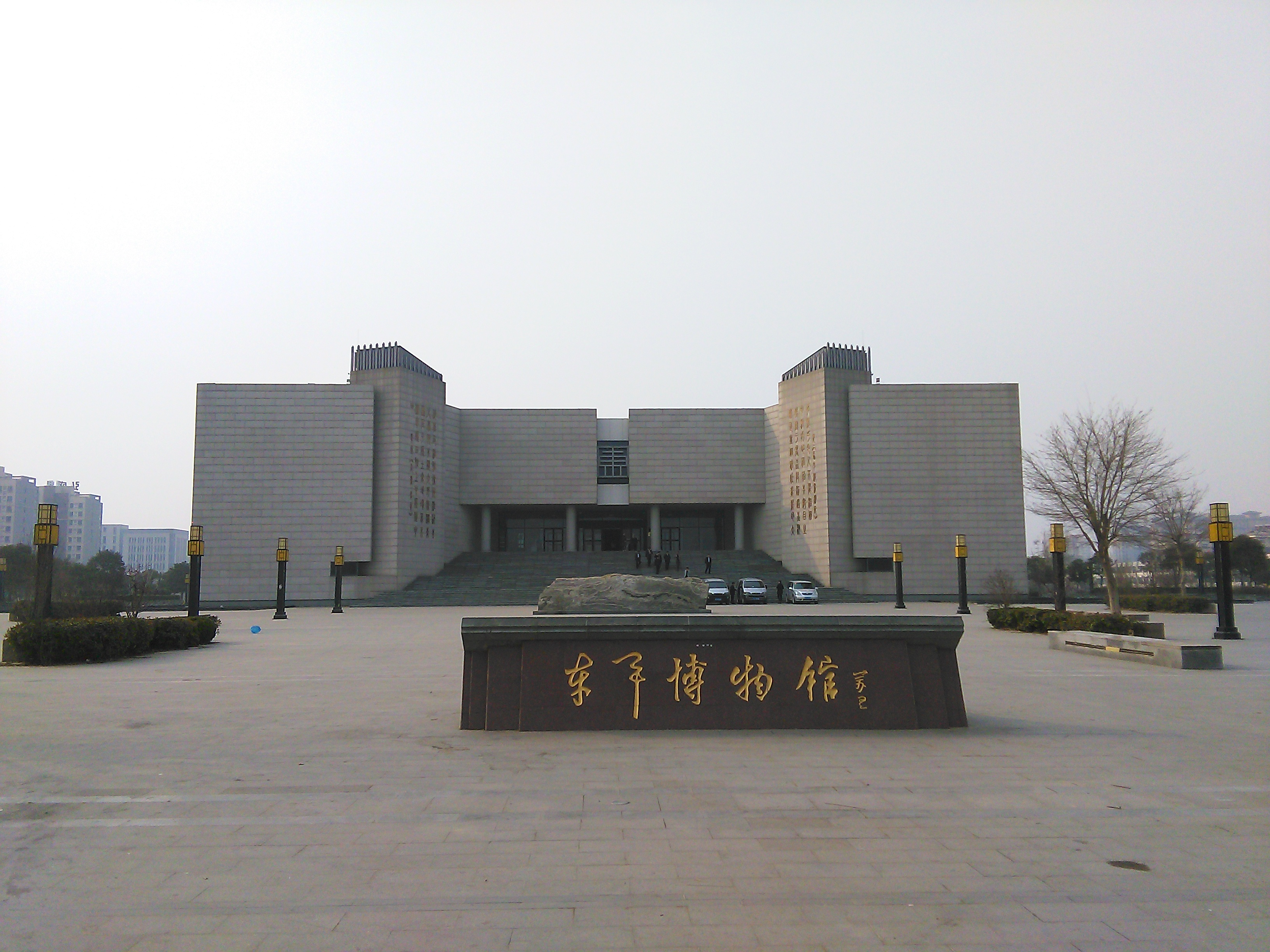 东平博物馆，在白佛山脚下